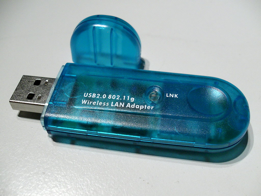 WLAN USB Stick